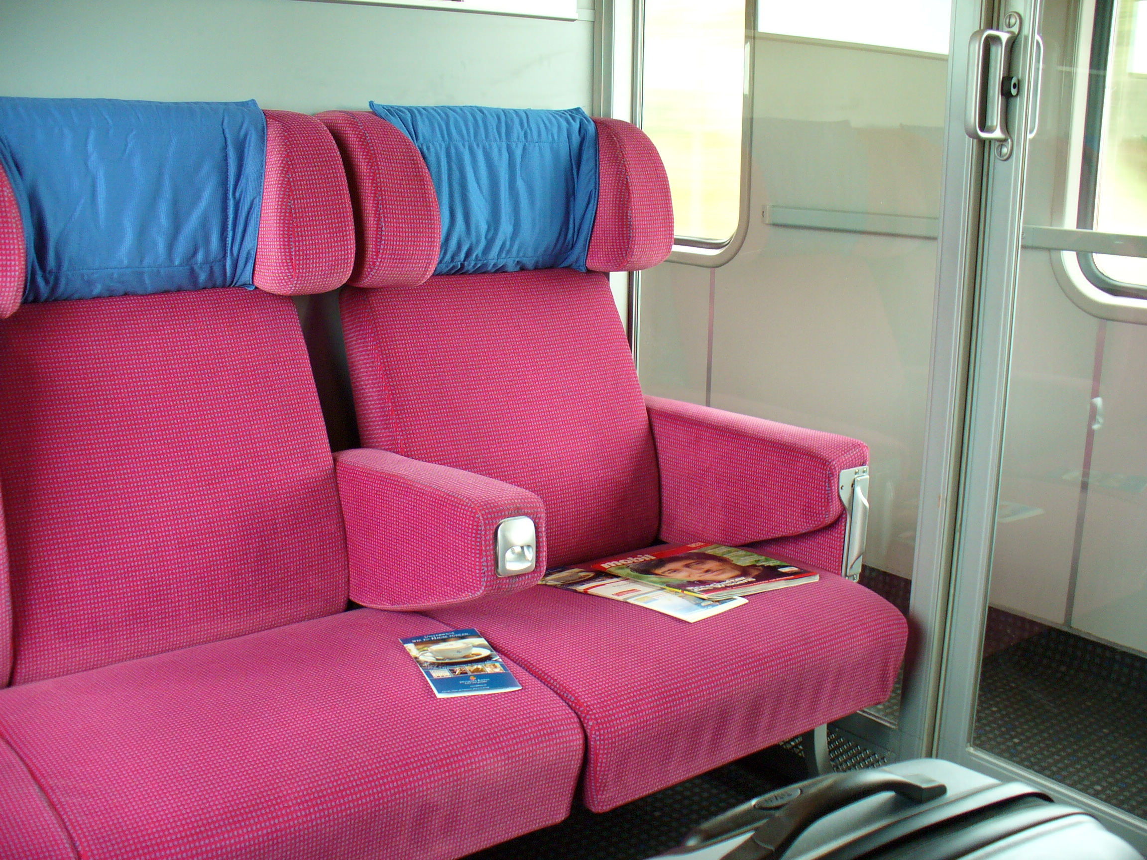 Abteil der Ersten Klasse im InterCity der Deutschen Bahn